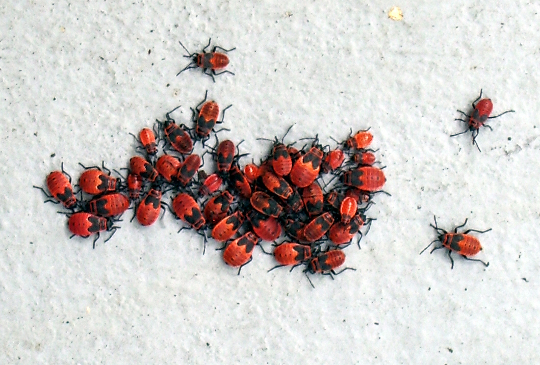 Feuerwanzen auf einer Hauswand in Uetersen